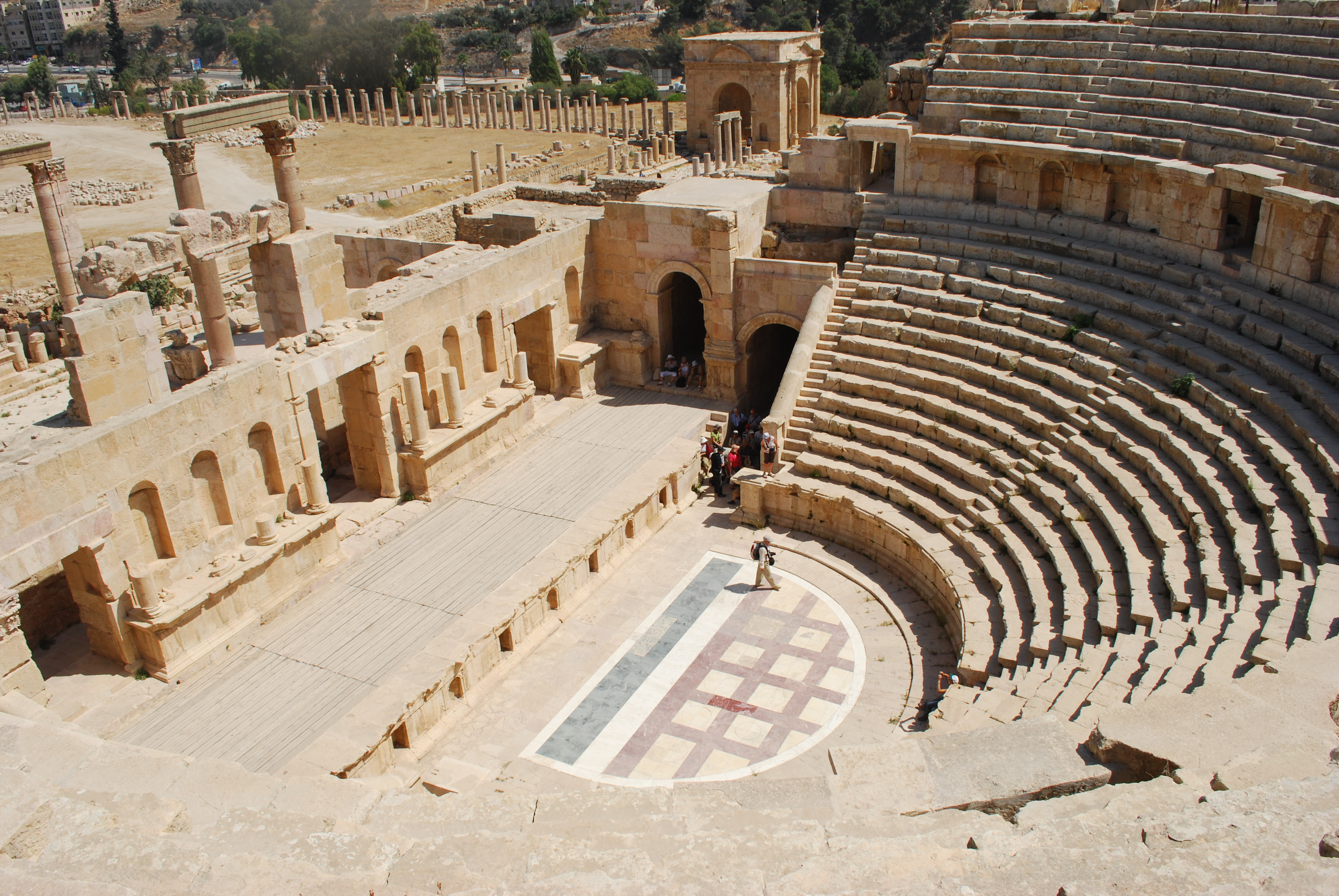 Le théâtre nord de Jerash.